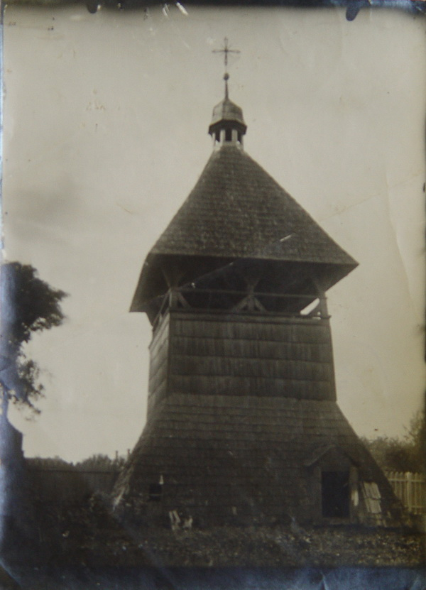 Беларуская (тарашкевіца): Слуцак (Słucak), вуліца Востраўская (vulica Vostraŭskaja). Царква Нараджэньня Хрыстова. Званіца.